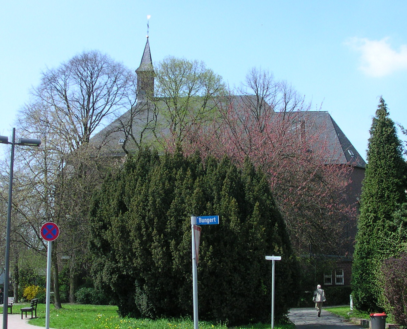 rk. Pfarrkirche “St. Barbara” in Aachen Rothe Erde